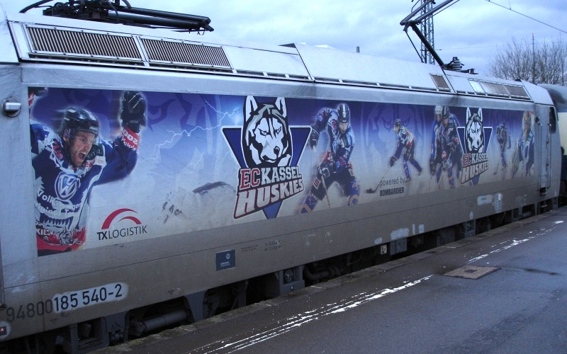 Happy Train der Kassel Huskies beim Play-Off Finale gegen Landshut